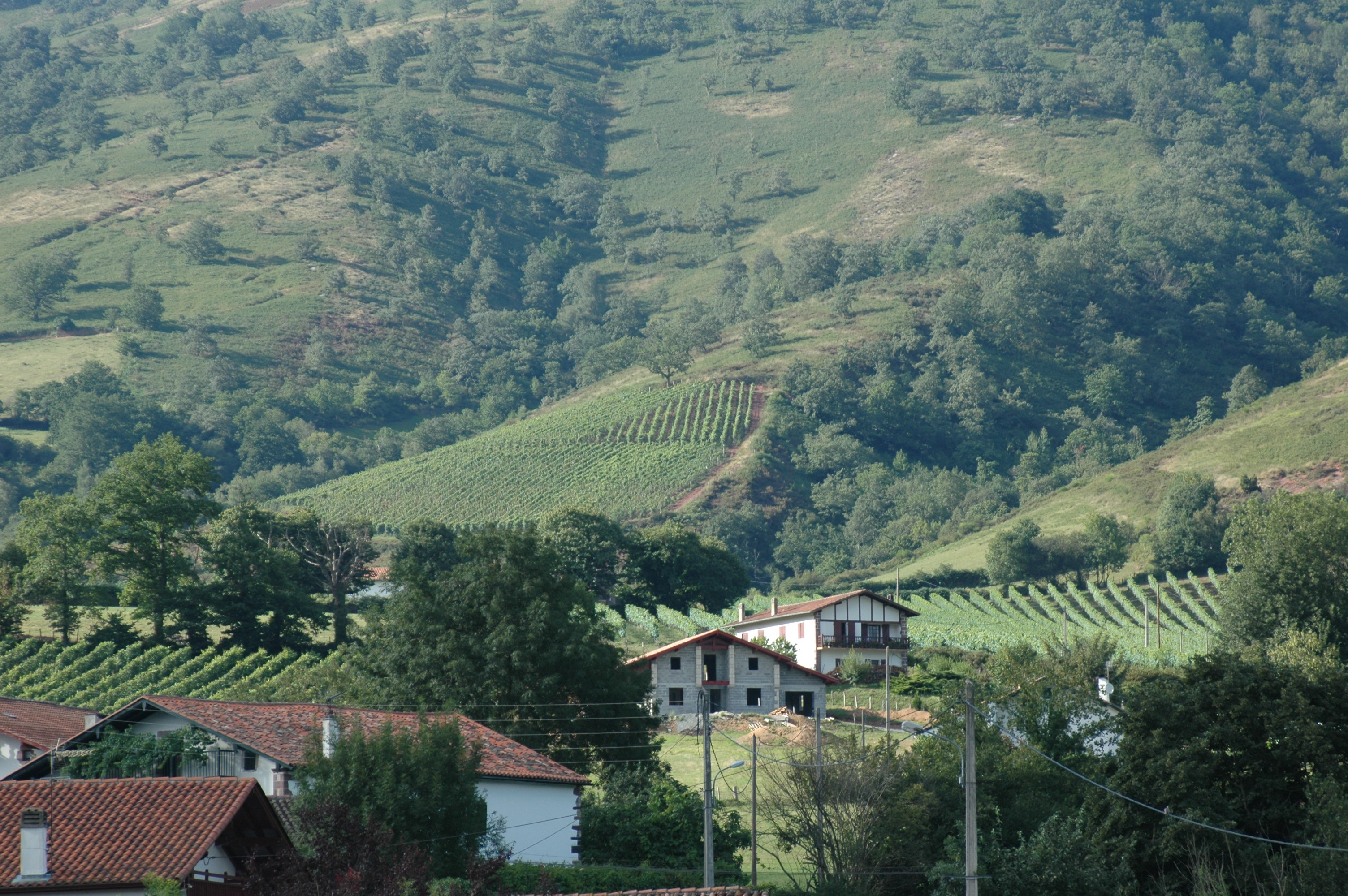 Irouléguy, le vignoble. Photo prise le 03/08/06 par Harrieta171